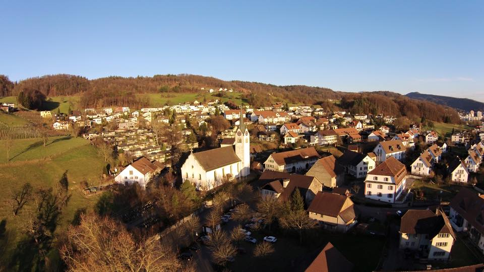 Blick auf Kirchdorf Gemeinde Obersiggenthal